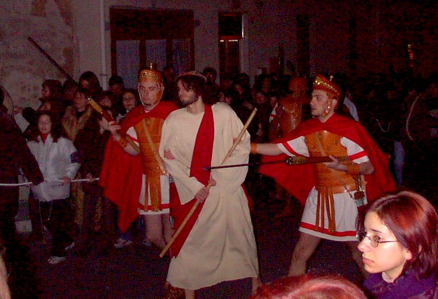 Foto liberamente concessa da E.Egiziano e non protetta da copyright